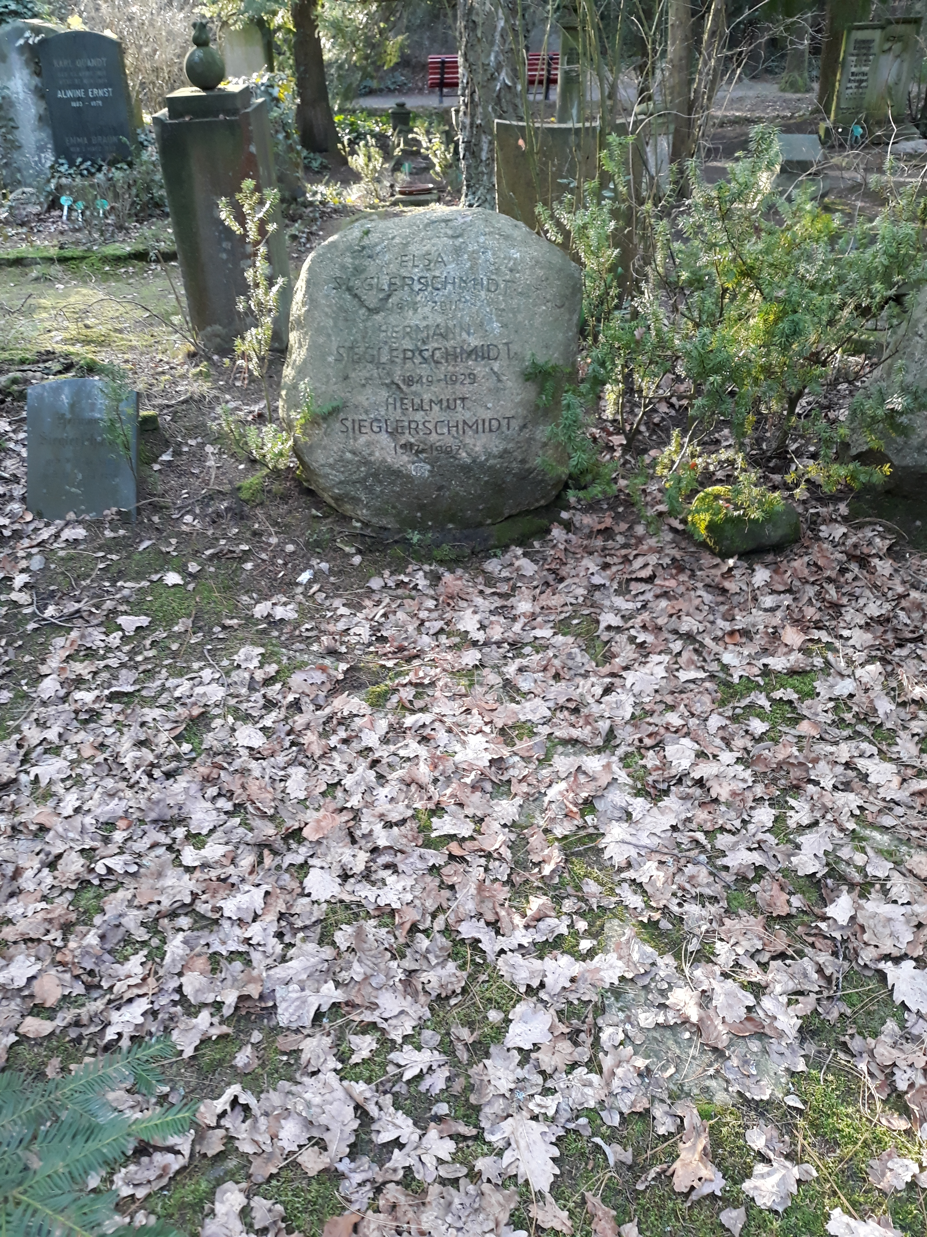 Das Grab des deutschen Politikers Hellmut Sieglerschmidt im Familiengrab auf dem Parkfriedhof Lichterfelde in Berlin.